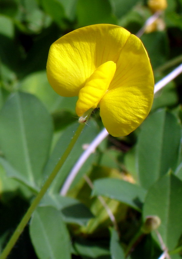 Author: Nurhafizah Abdullah